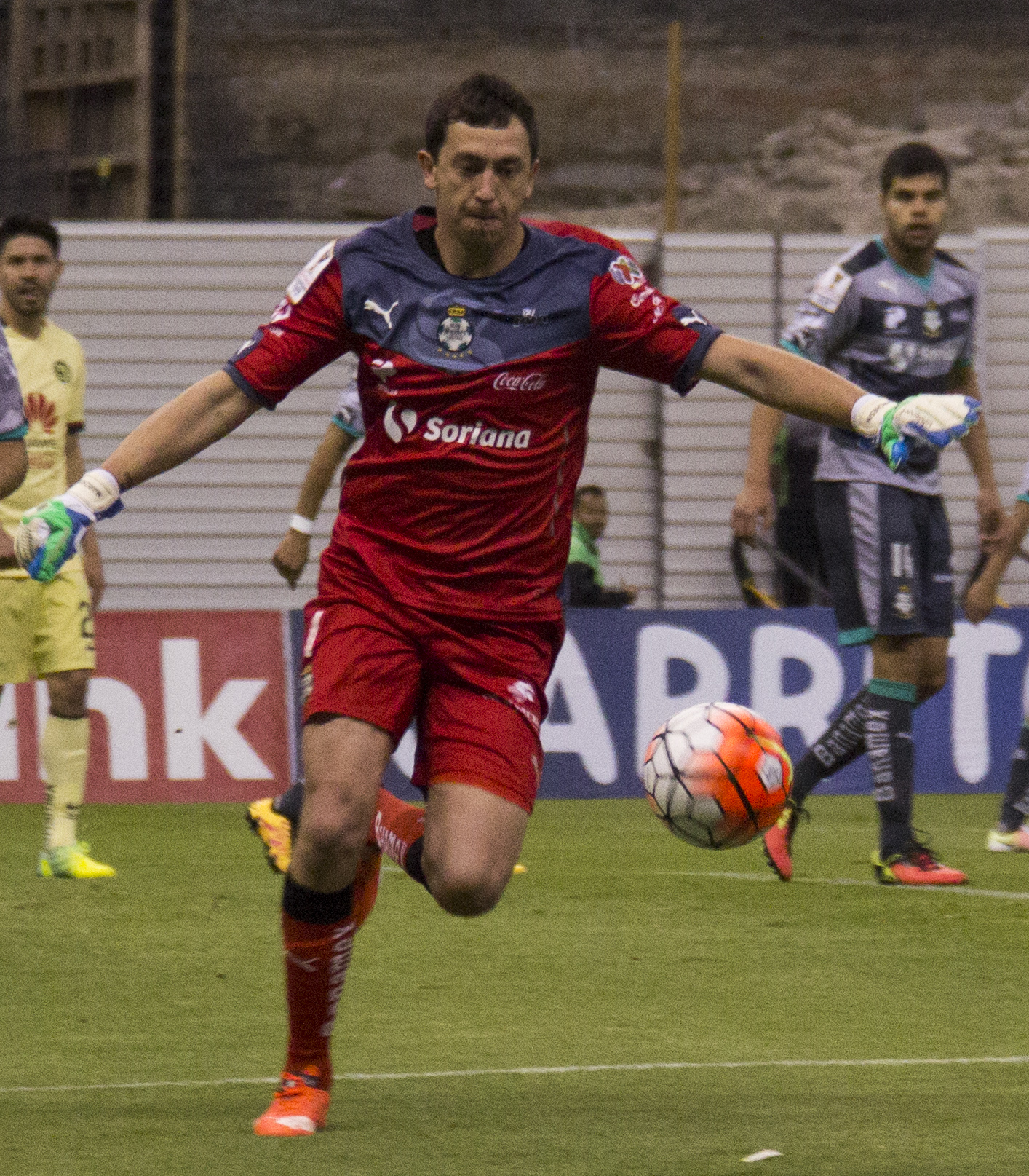 América vs Santos